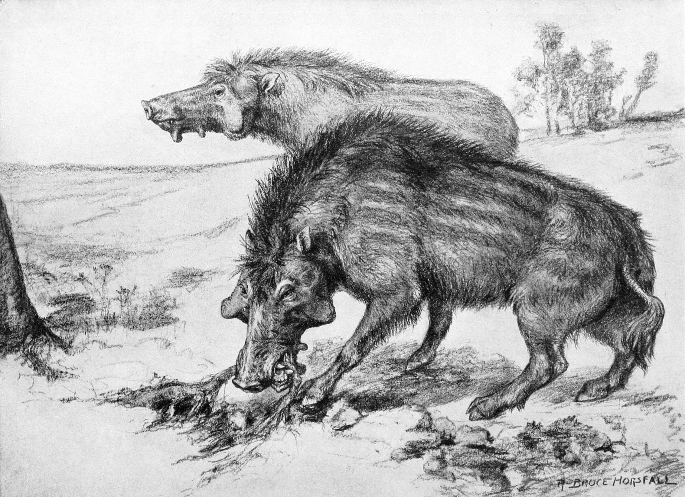 Archaeotherium ingens.